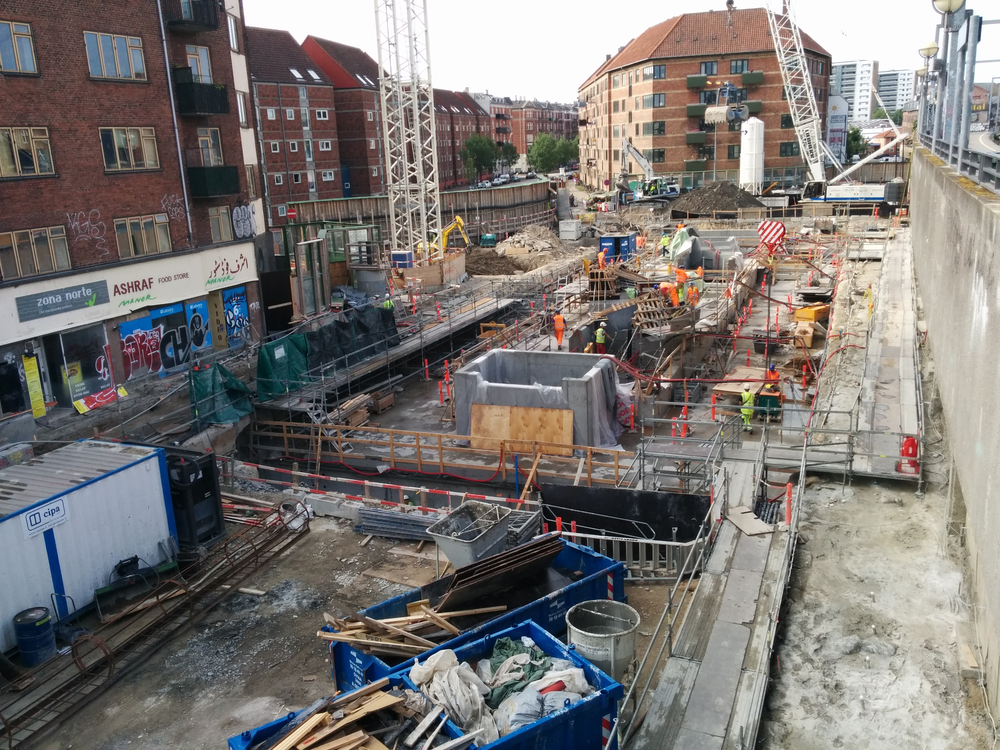 Byggeplads til den kommende metrostation ved Nørrebro st.